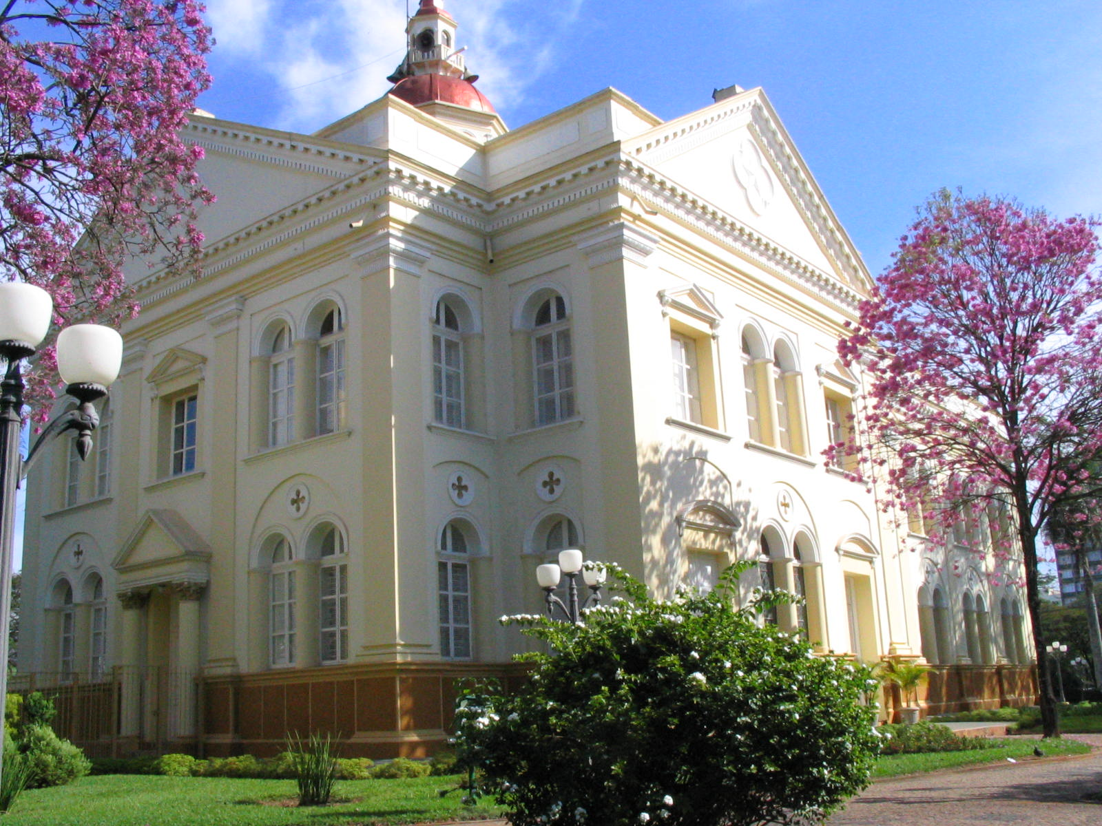 Basílica Nossa Senhora do Patrocinio, em Araras